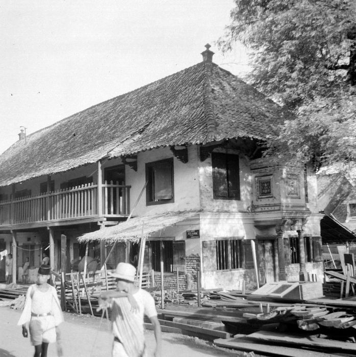 Negatief. Gebouw, waarvan de bovenverdieping in gebruik is als moskee, eronder twee woningen, Djakarta, Pekodjan